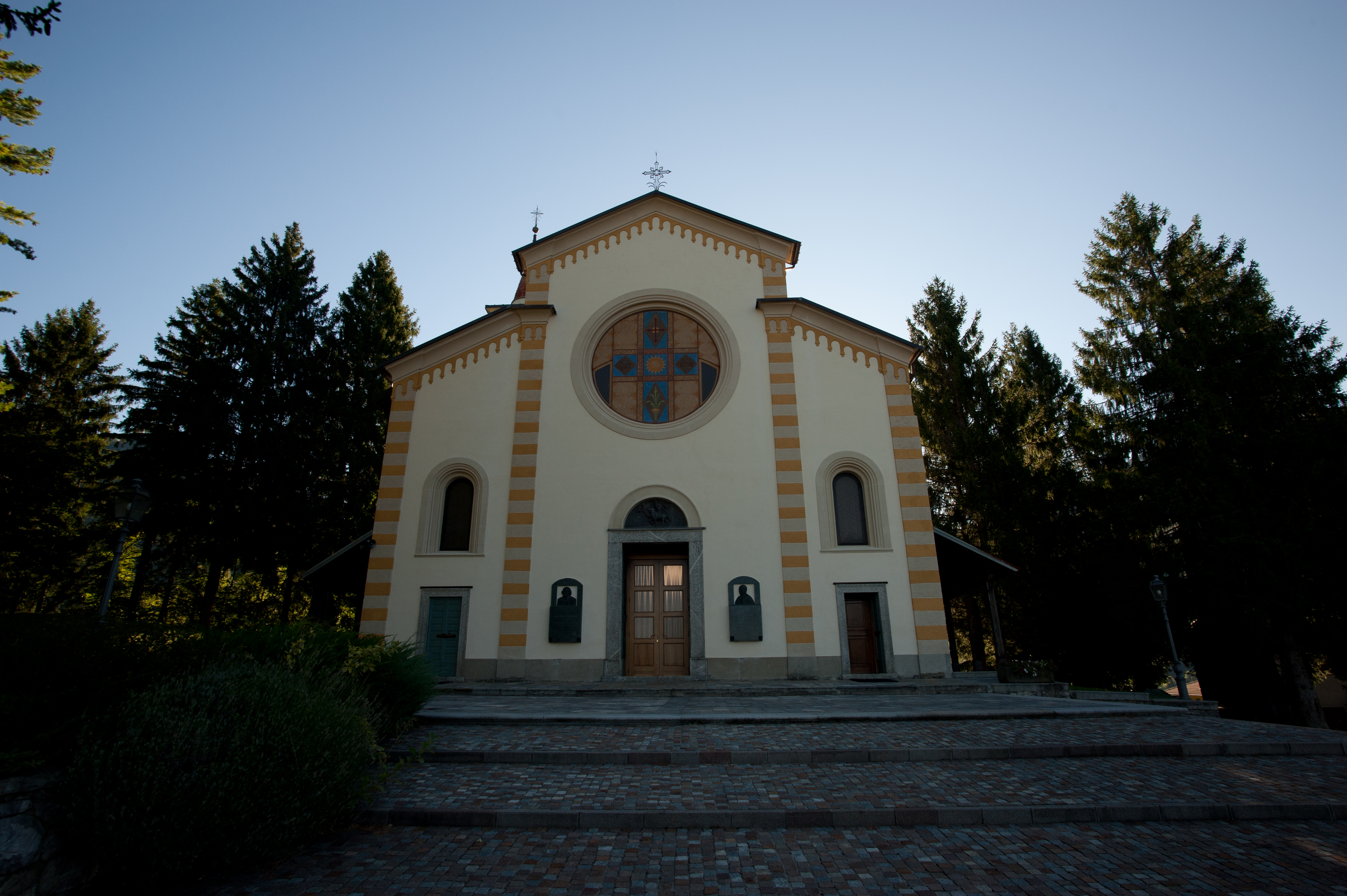 Chiesa di San Vittore Martire This is a photo of a monument which is part of cultural heritage of Italy.